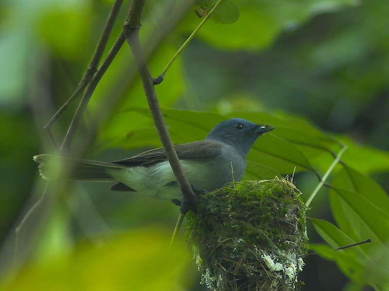 Hypothymis azurea, Female, Taipei Botanical Garden, 2008.